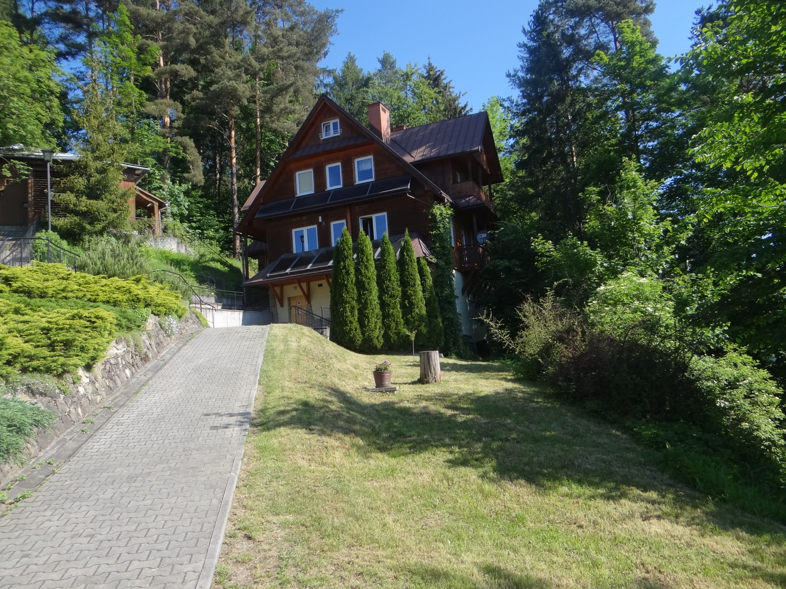 Kopa Górka. Ośrodek Ruch Światło-Życie